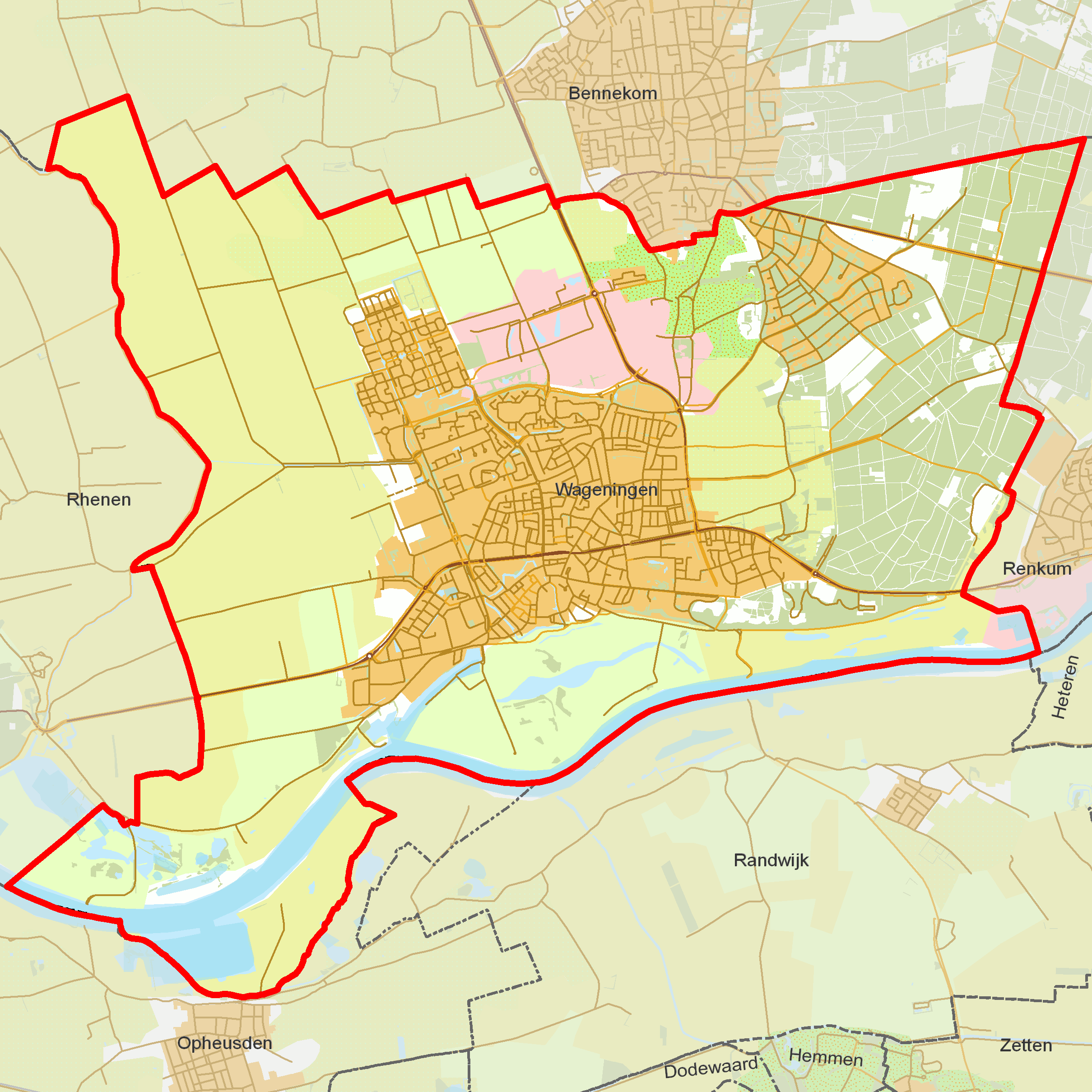 BAG woonplaatsen - Gemeente Wageningen.png